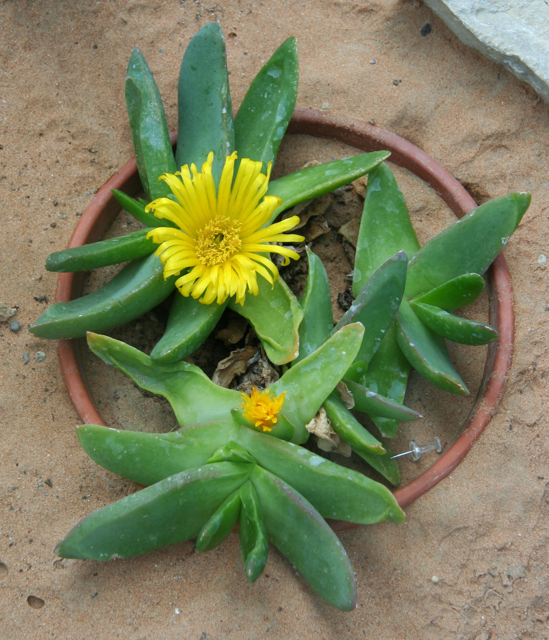 Glottiphyllum salmii im Botanischen Garten Hamburg